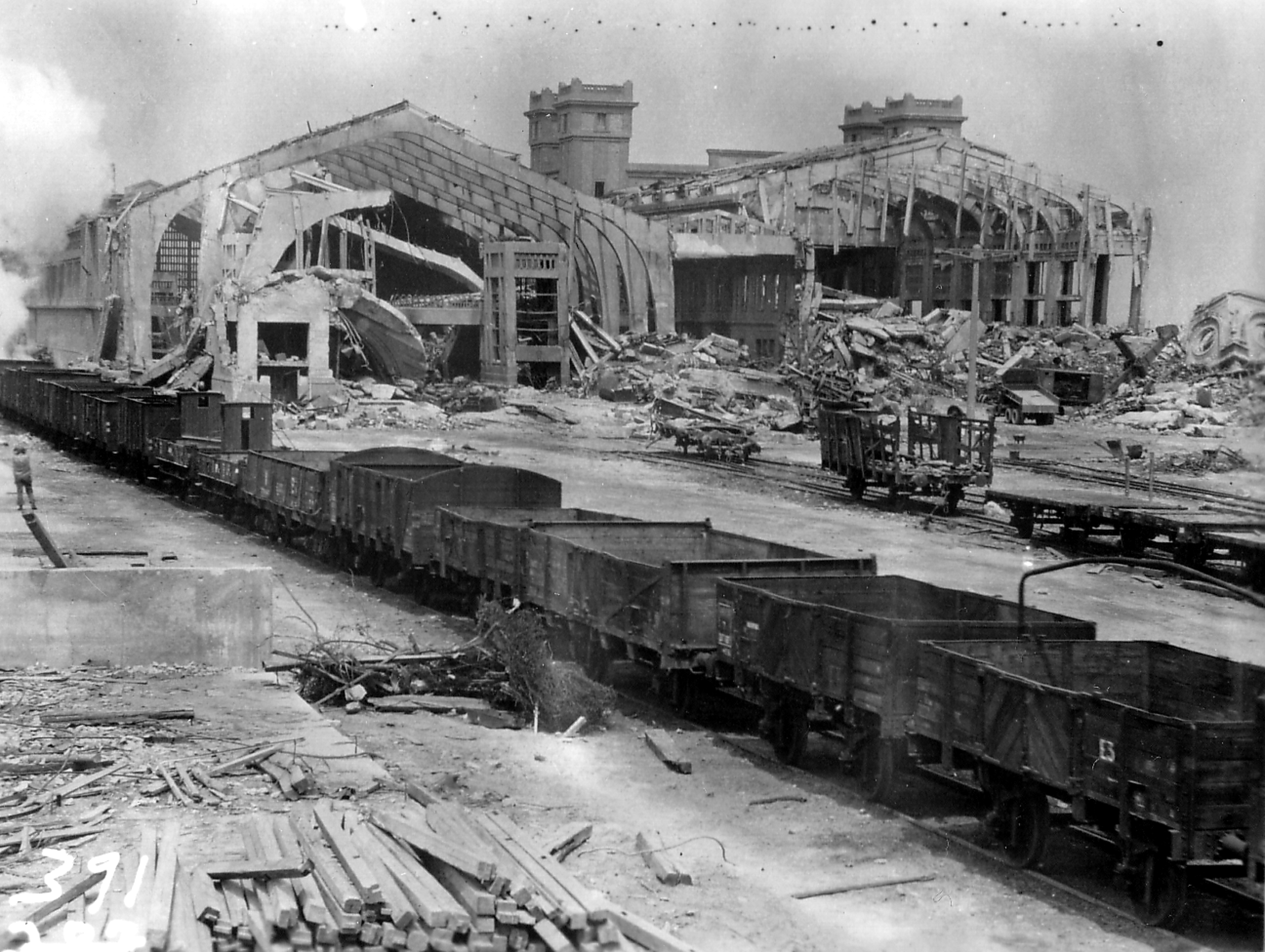 Cherbourg – Port, infrastructures portuaires, ville et libération.